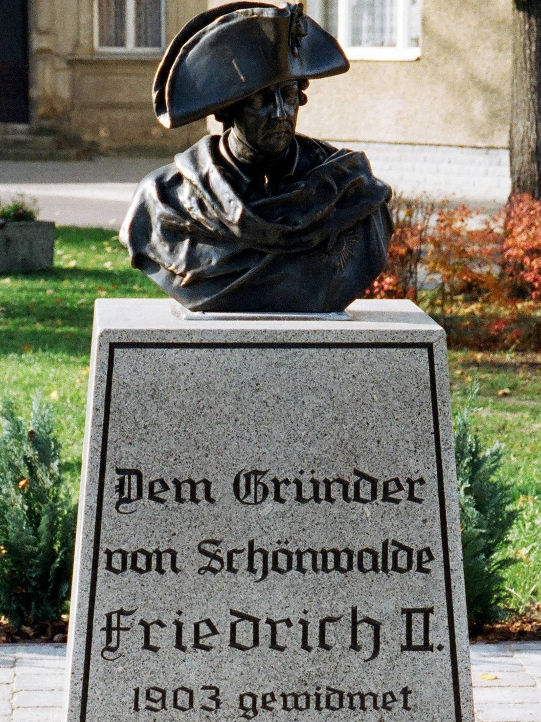 Denkmal Friedrich II., Schönwalde (Barnim), Land Brandenburg, Deutschland